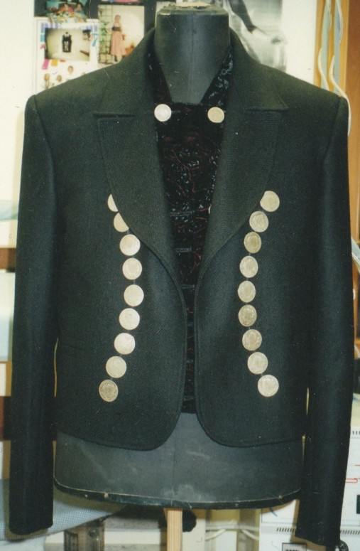 Hallertauer Jancker mit Münzknöpfen